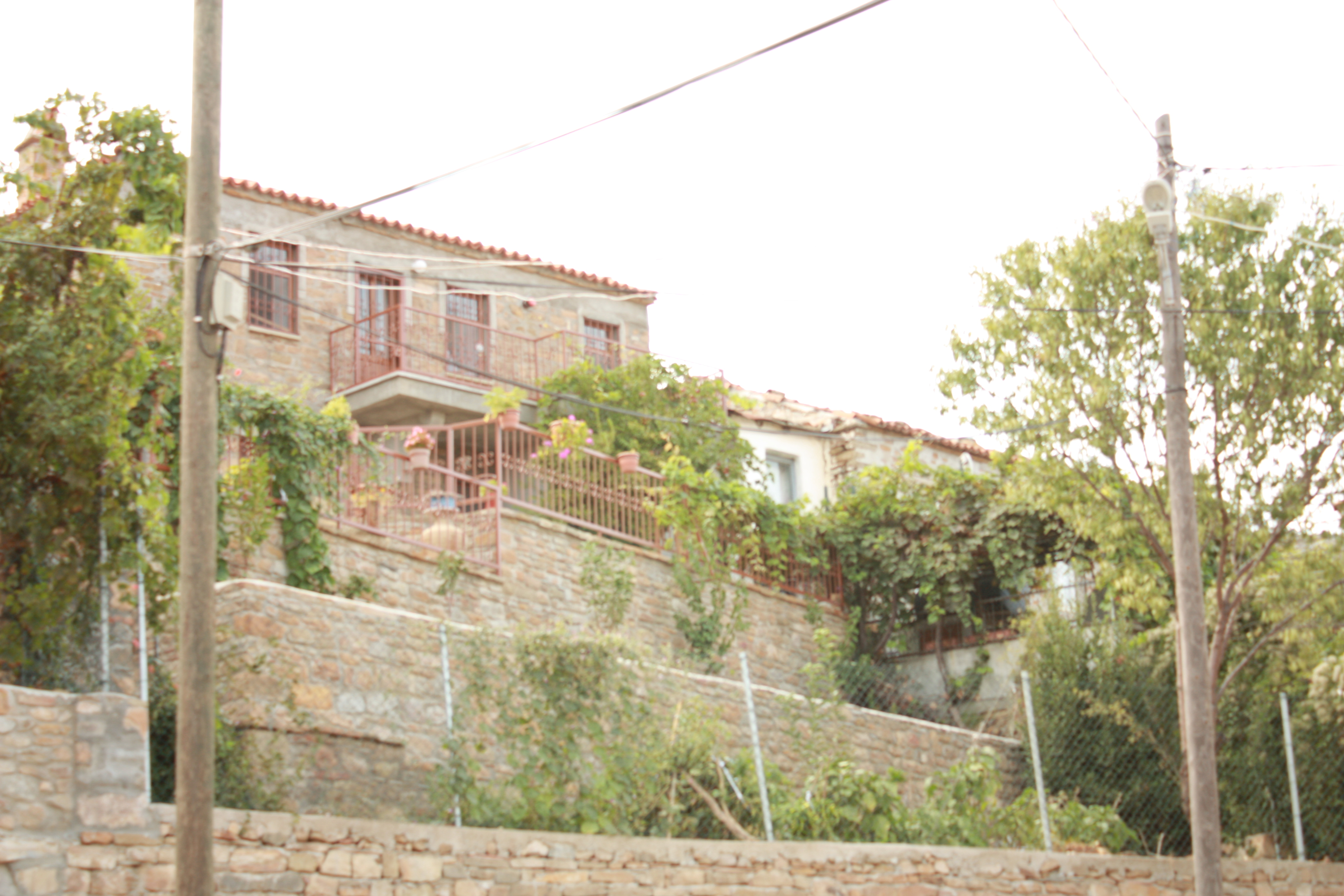 Zeytinliköy gökçeada imroz ÇANAKKALE